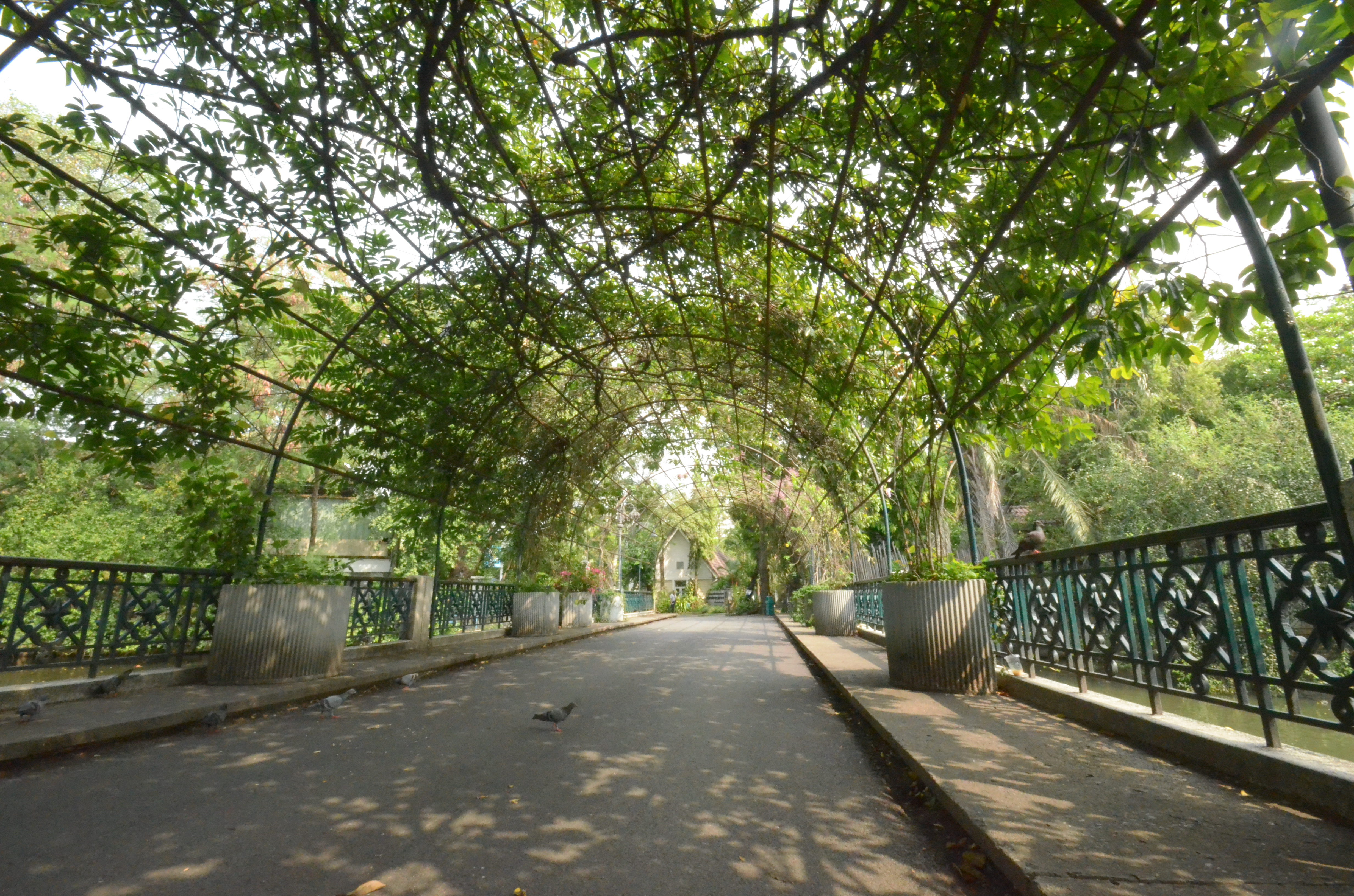 สะพานปลาที่สวนสัตว์ดุสิต